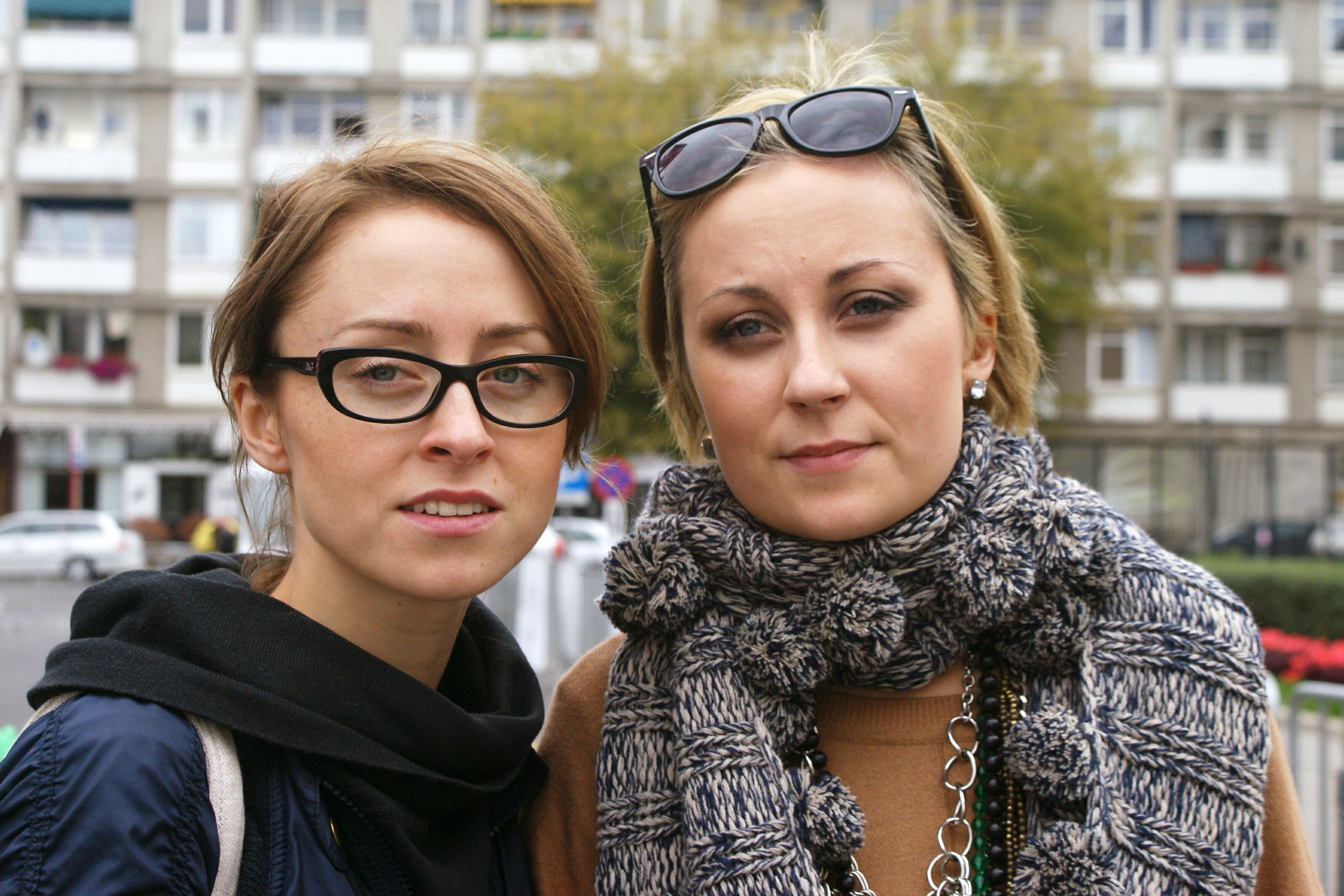 Natalia & Paulina Przybysz